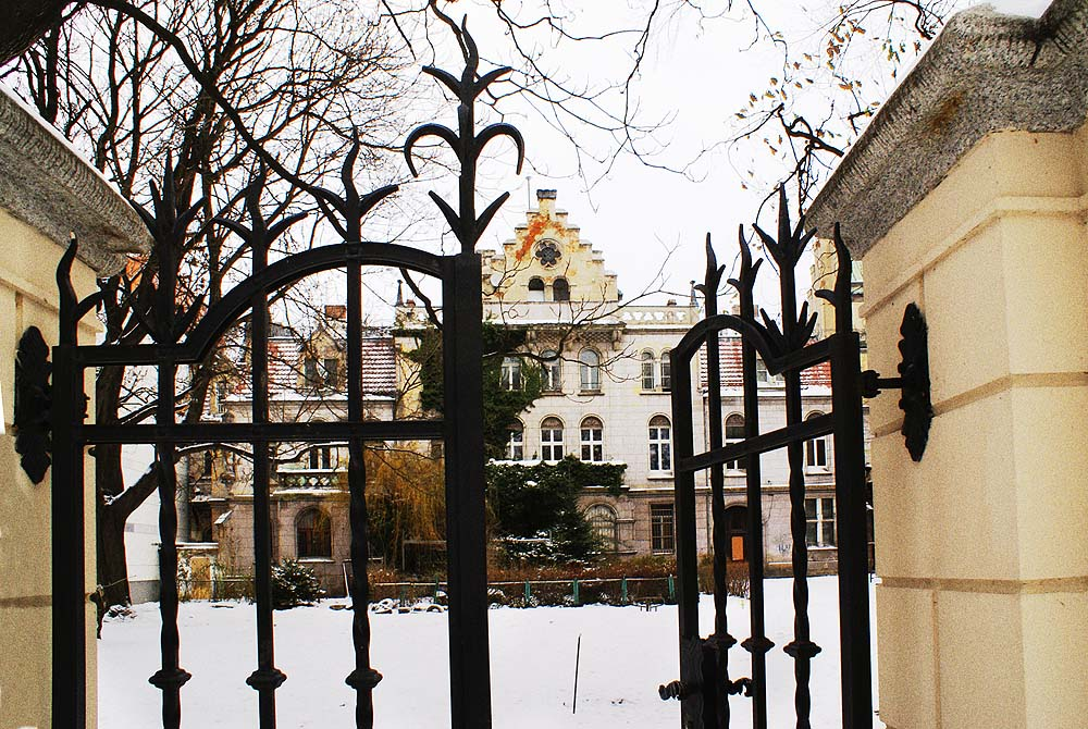 Dom mieszkalny, d. pałac miejski Włodkowica 4, Miasto Wrocław - Stare Miasto